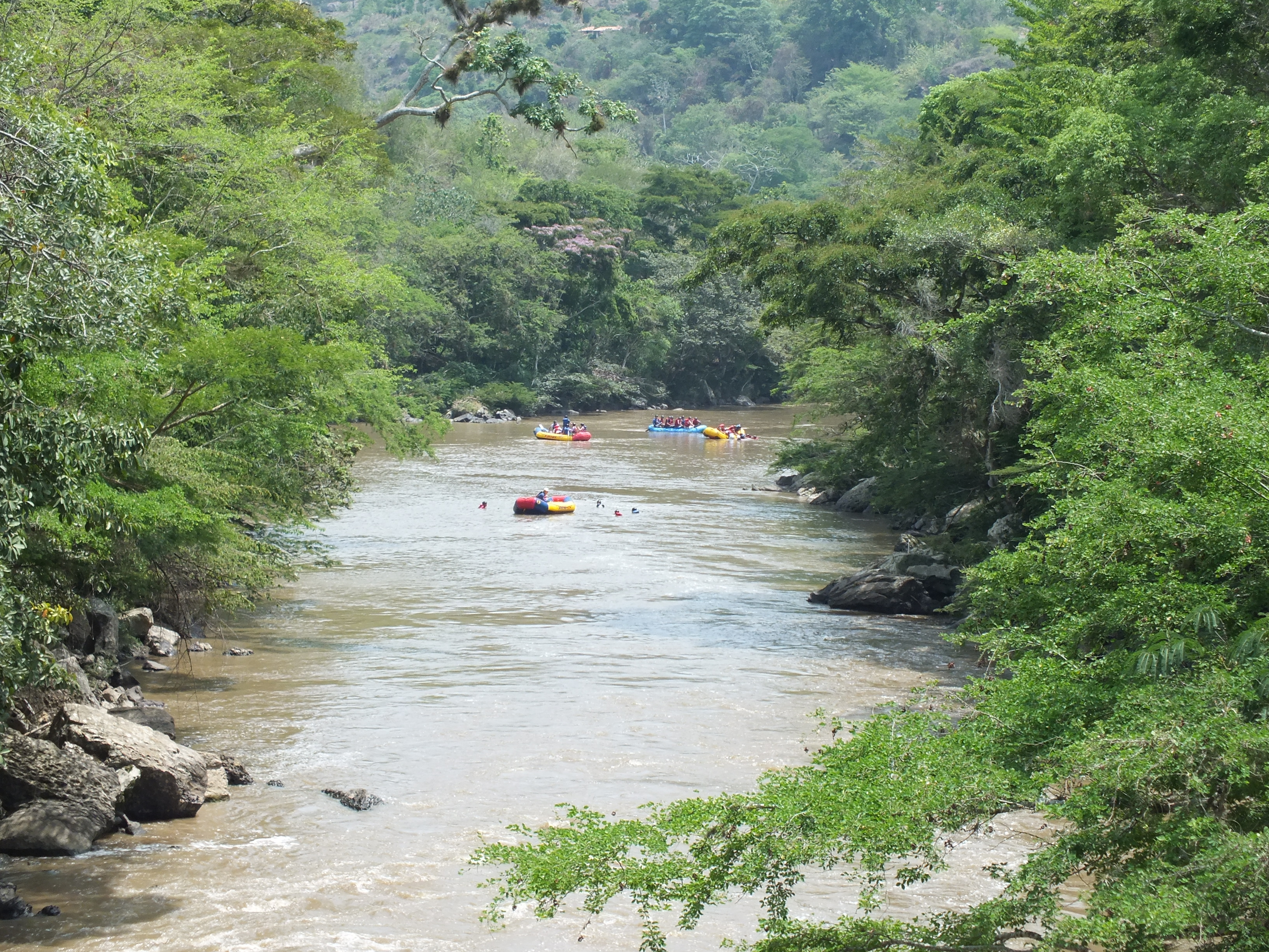 El caudaloso río santandereano es un monumento natural perfecto para la práctica de deportes extremos.